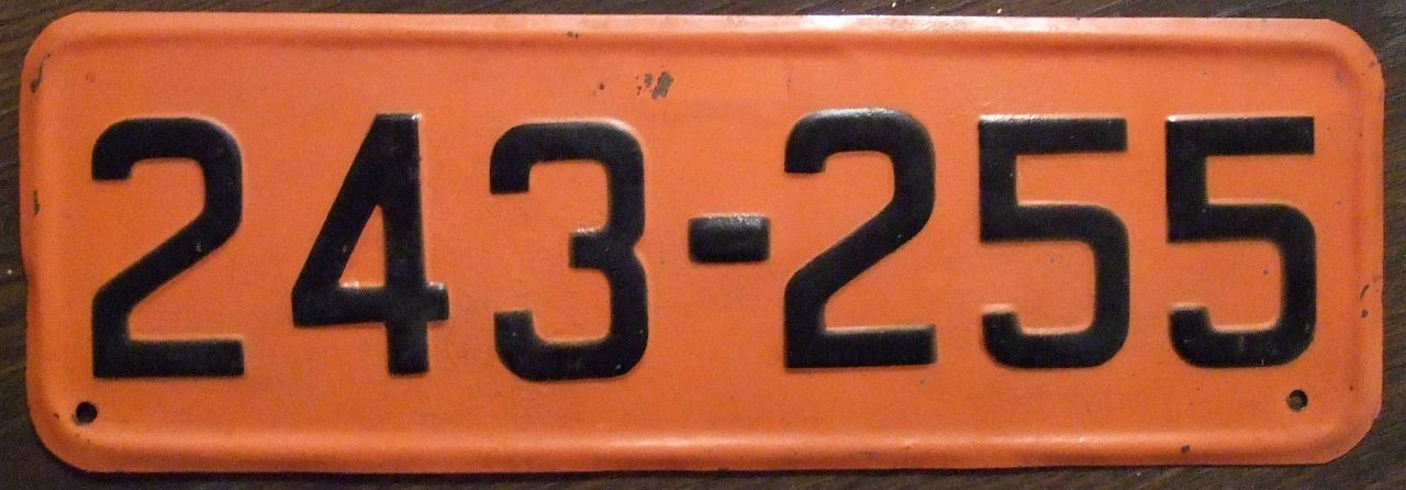 ISRAEL 1955-71 passenger plate